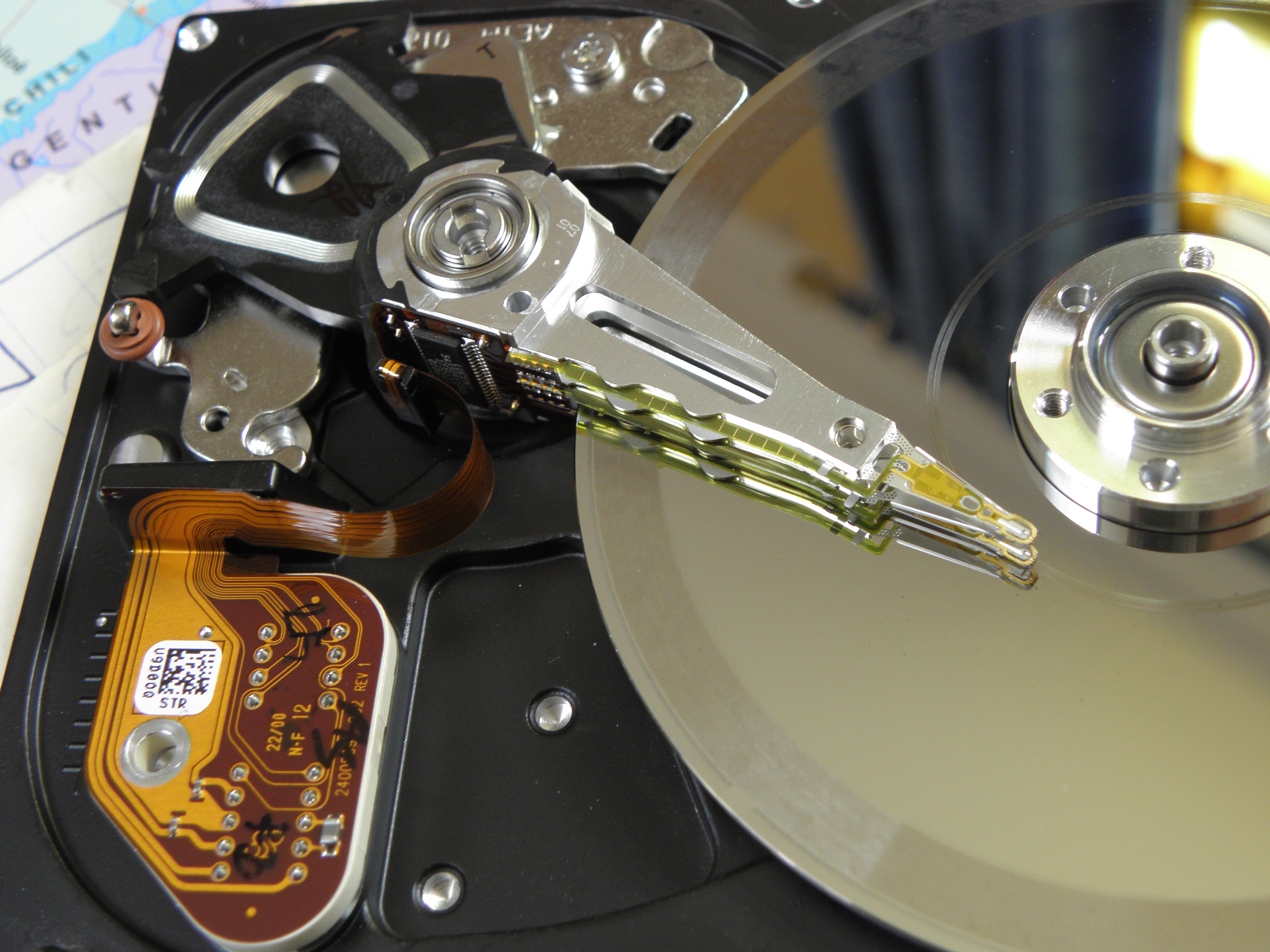 Vue globale des têtes et plateaux du disque dur